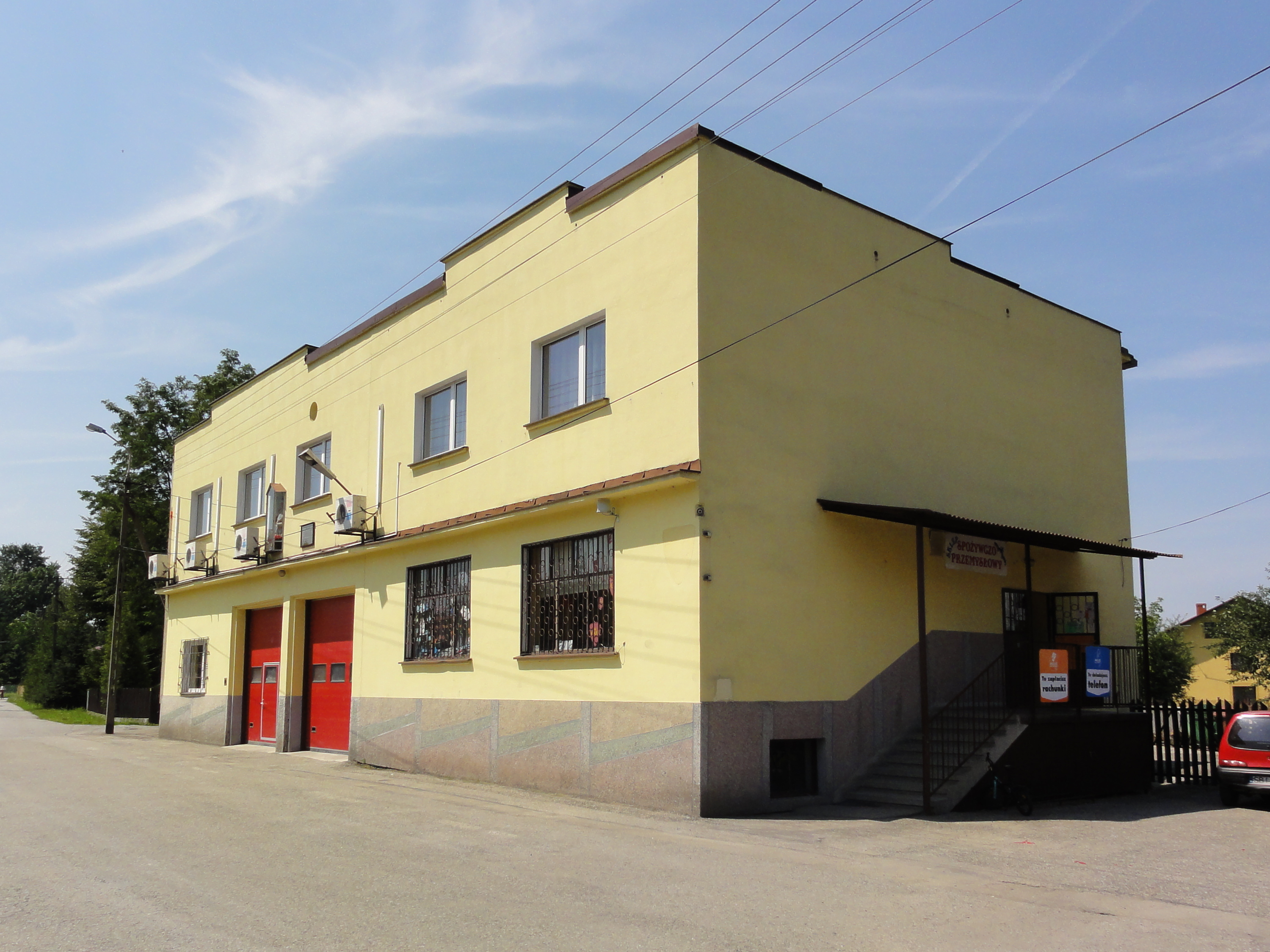 OSP Międzyrzecze Dolne